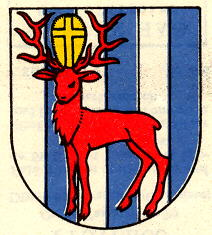 Wappen von Provence Kanton Waadt Schweiz